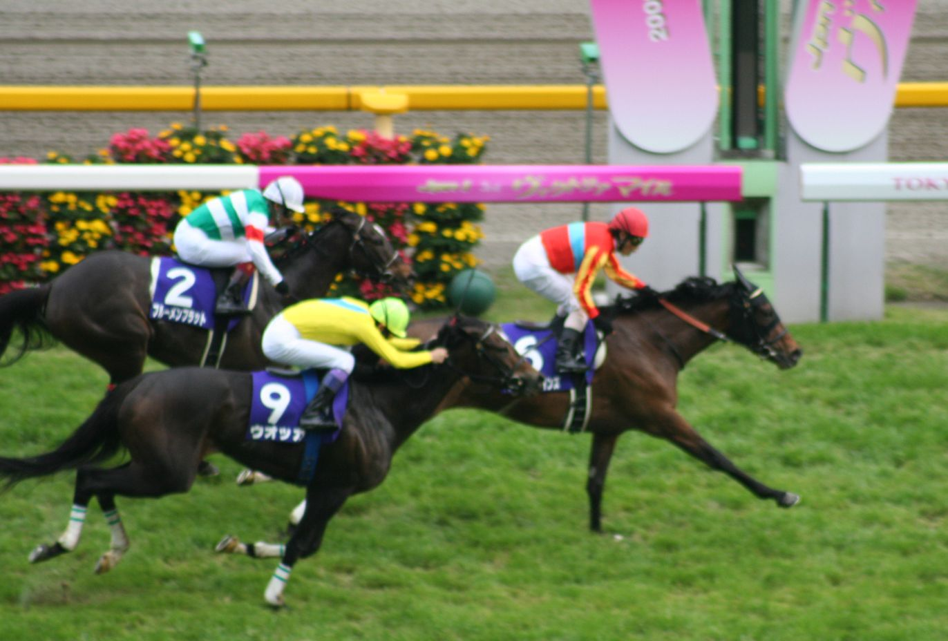 第3回ヴィクトリアマイル（東京競馬場）、手前からウオッカ、エイジアンウインズ、ブルーメンブラット